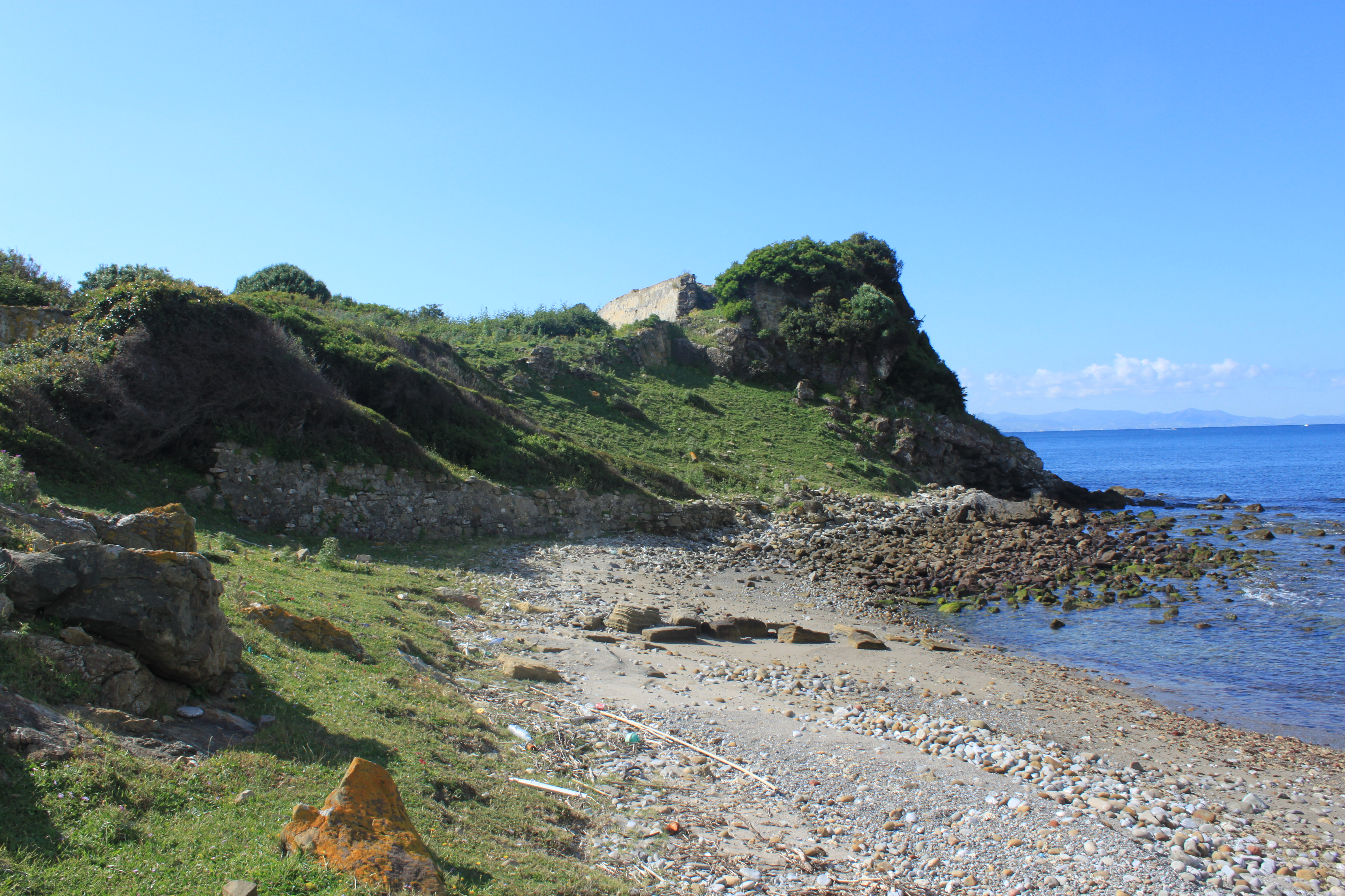 Vista general de el fuerte de El Tolmo desde el sur. Se observa el tómbolo sobre el que está construido. De izquierda a derecha aparecen los muros del baularte sur y la escarpa de la muralla que coronaba el acantilado. La parte alta de la estructura estaba rematada por la batería artillera. Al fondo se aprecia la costa de Marruecos.